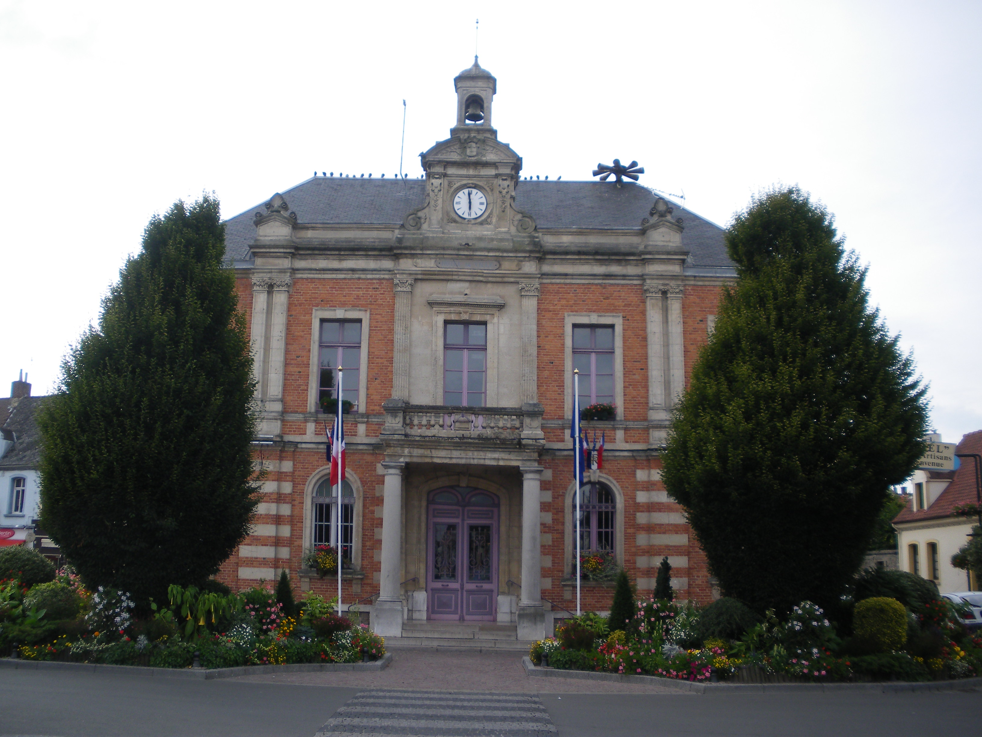 Hôtel de ville d'Etaples.